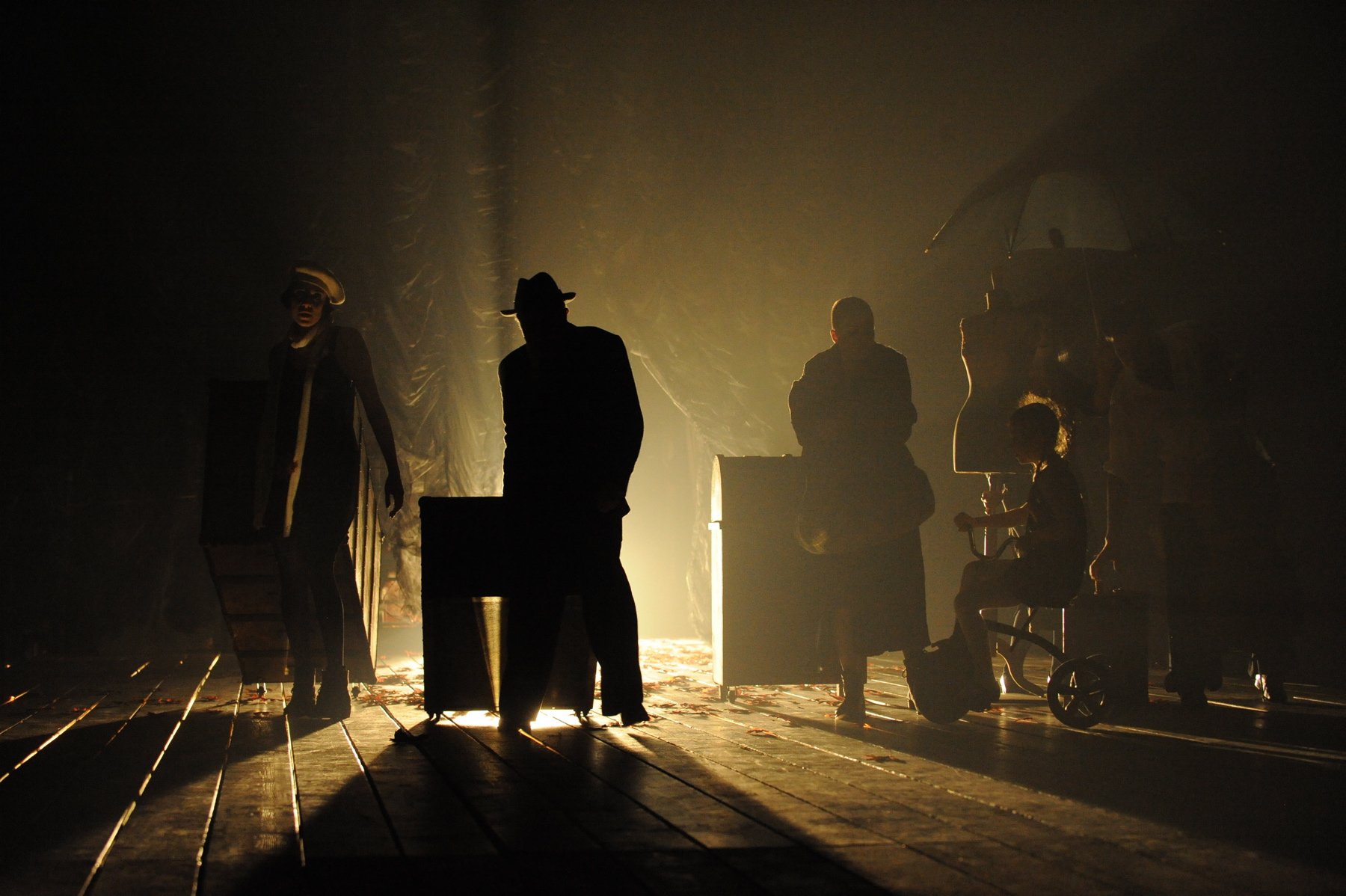 גן הדובדבנים, תיאטרון גשר